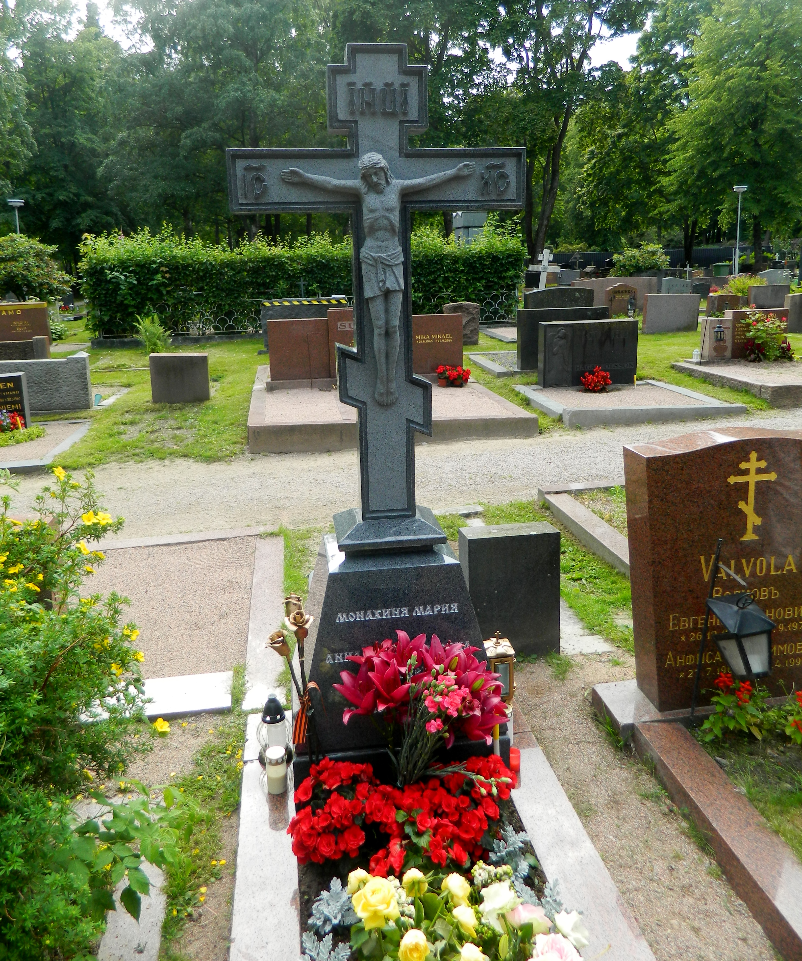 Anna Vyrubovan hauta Helsingin ortodoksisella hautausmaalla